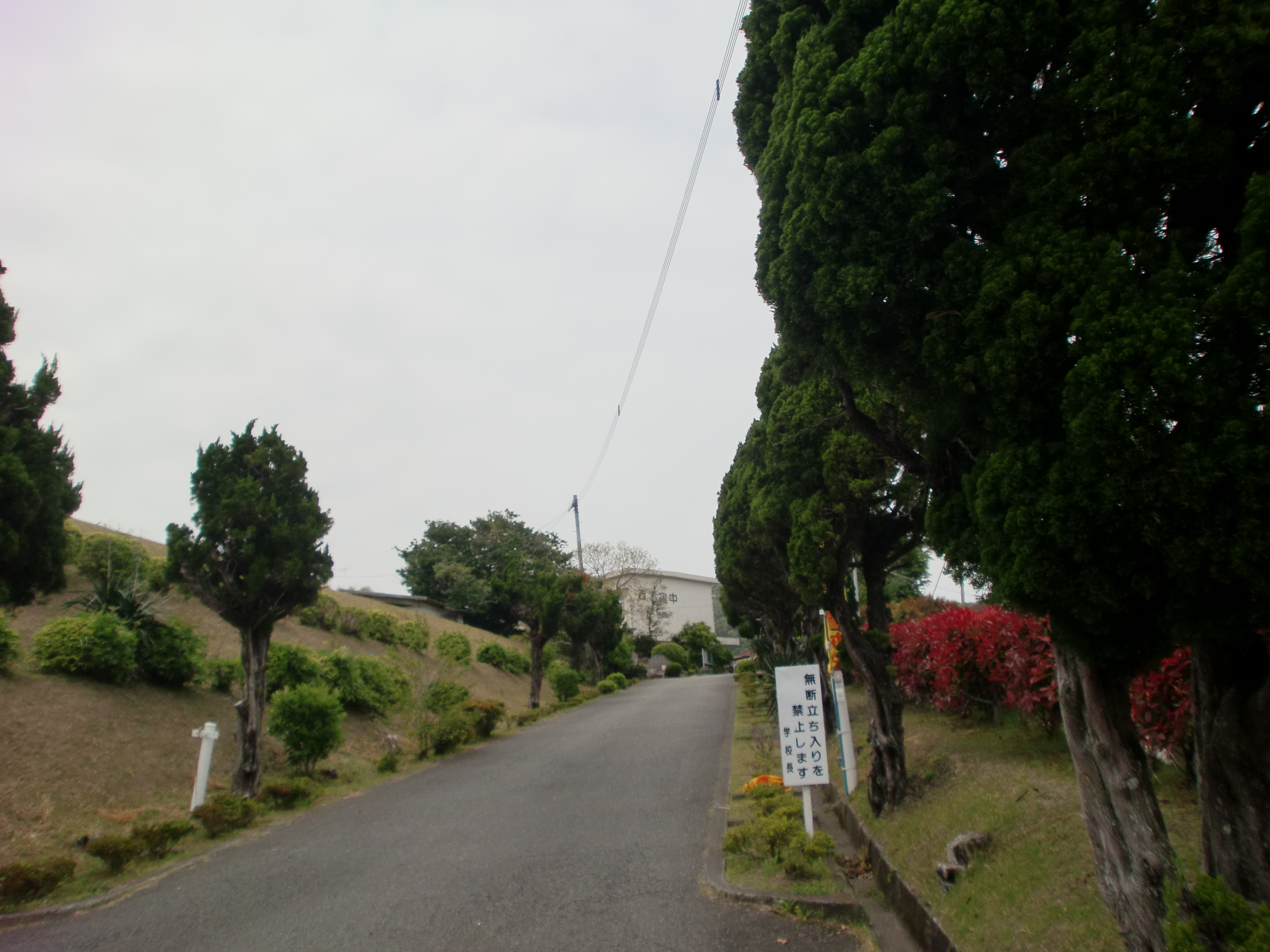 指宿市立西指宿中学校の外観。